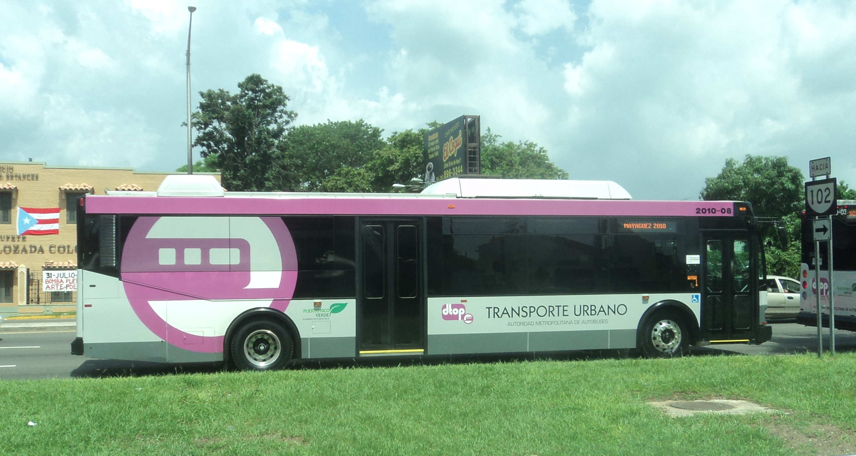 Autobús eléctrico Orion VII Next Generation construído en 2010.